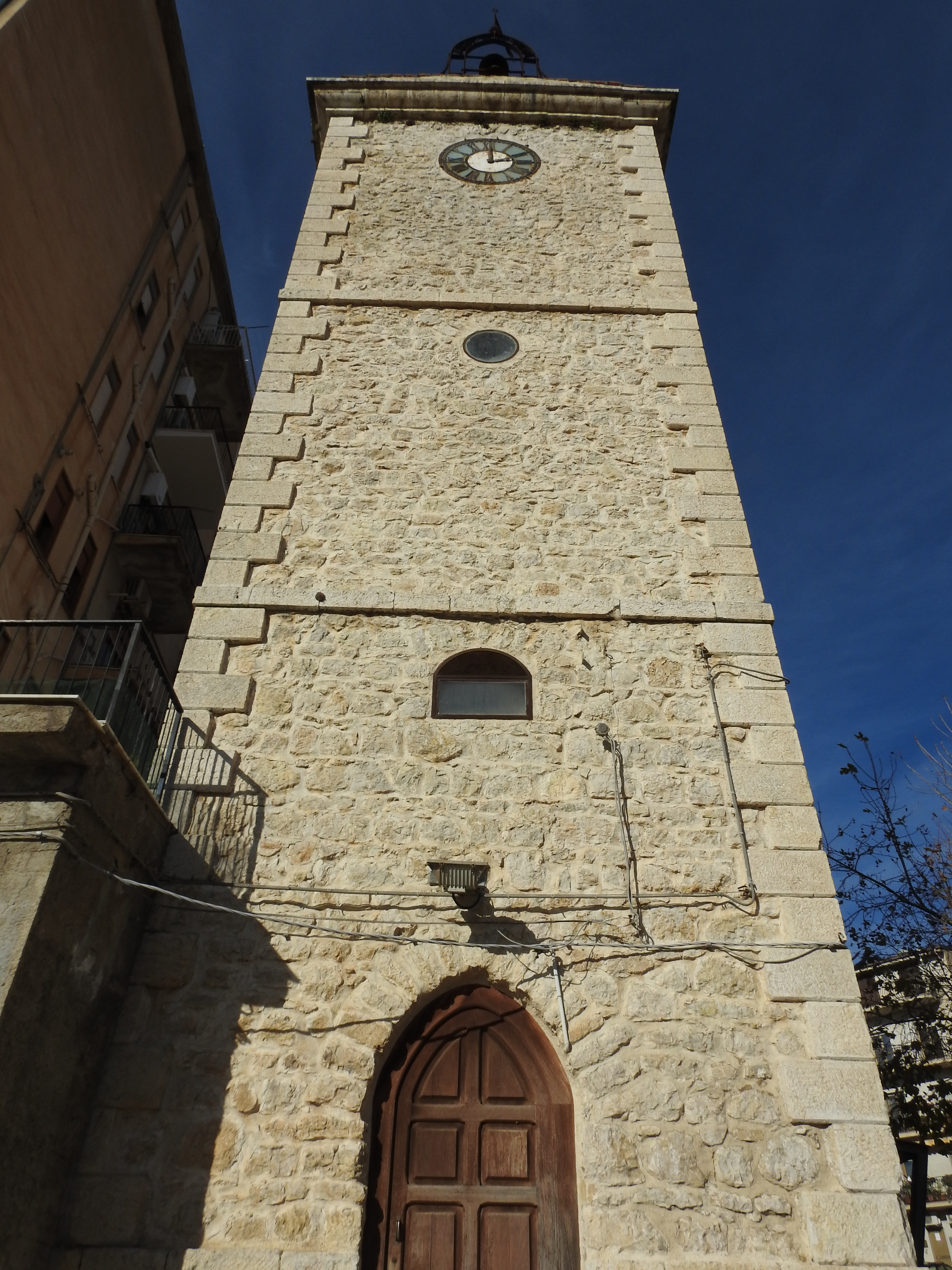 Bivona - Torre dell'Orologio